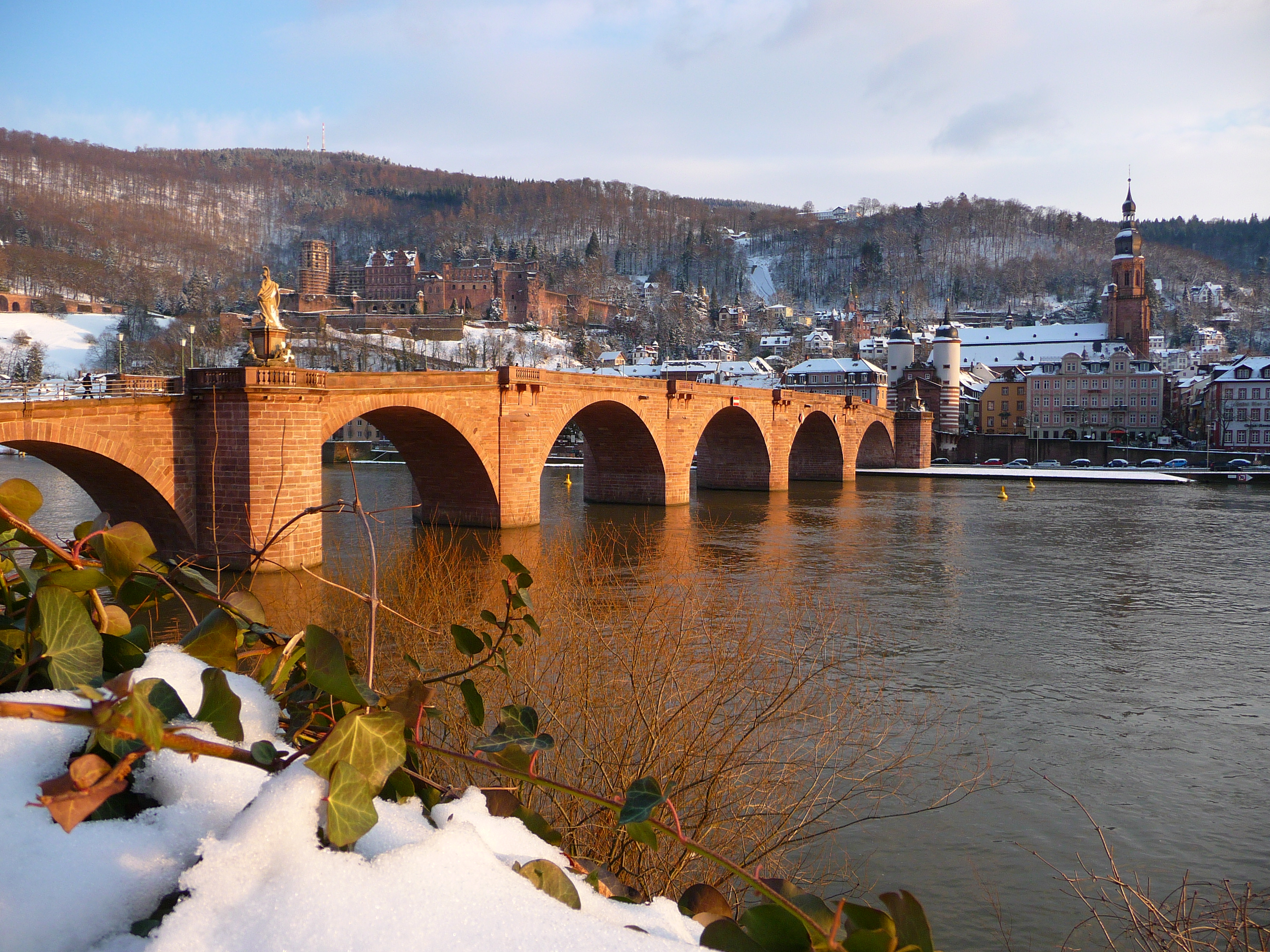 Blick auf die Heidelberger Altstadt mit Schloss, Alter Brücke, Heilig-Geist-Kirche (Baden-Württemberg, Deutschland)